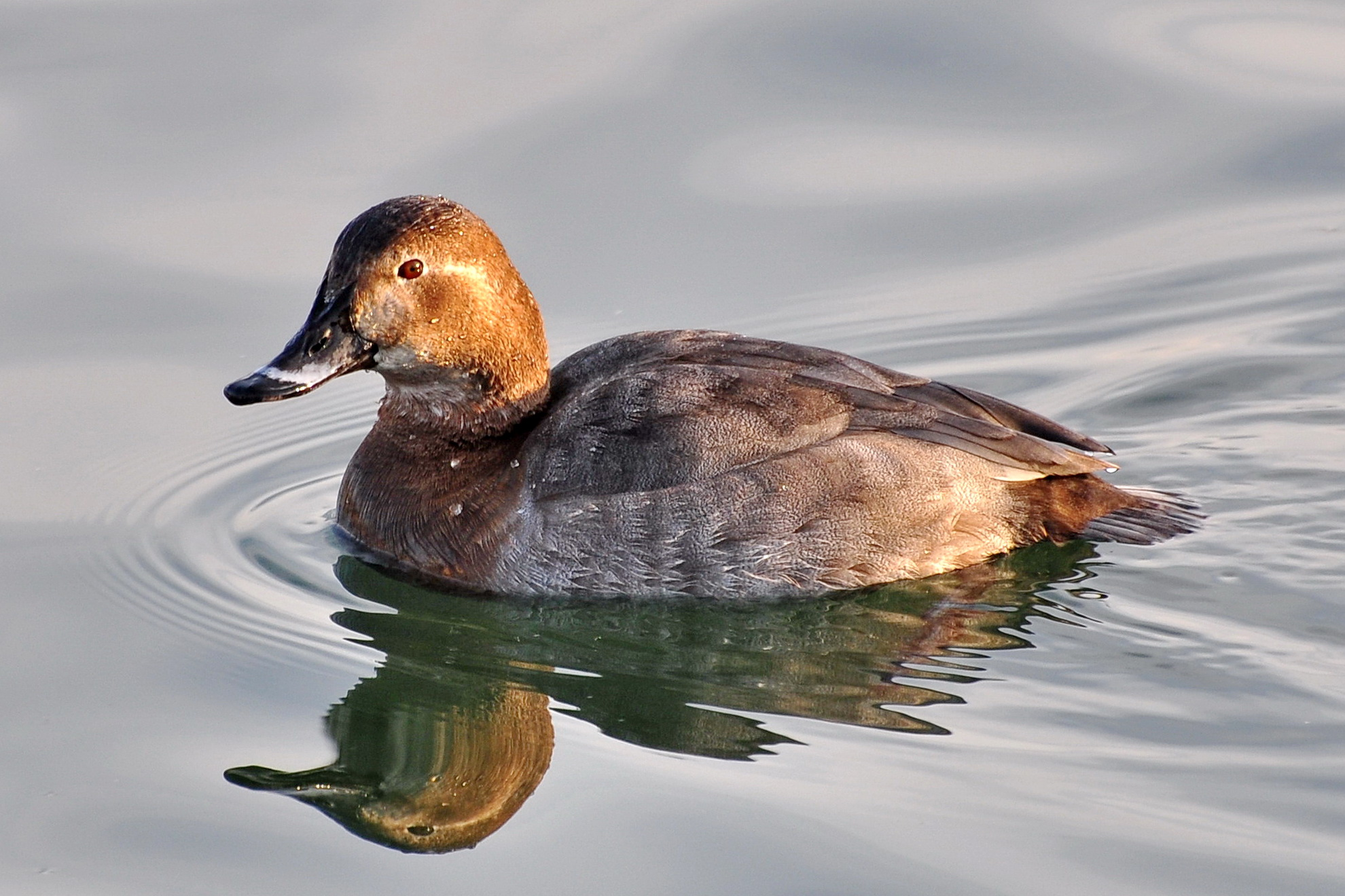 Aythya ferina, Busskirch in Jona (Switzerland)